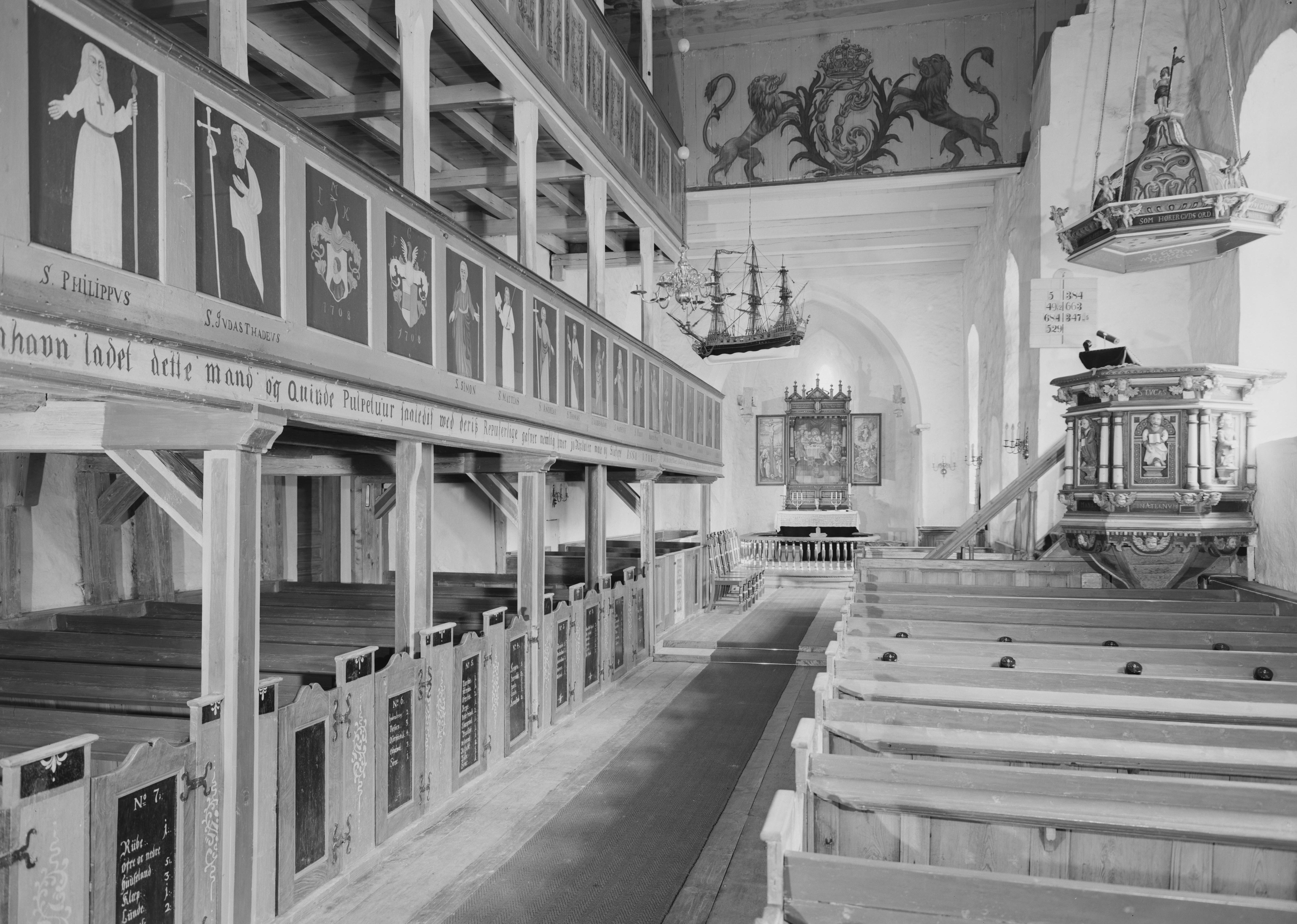 Bildet er hentet fra Nasjonalbibliotekets bildesamling Fjære, Grimstad, Aust Agder